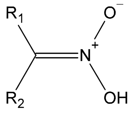 Nitronaat